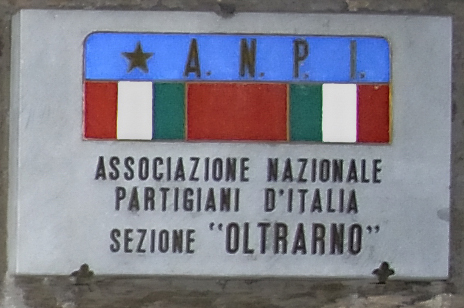 targa in pietra della Sezione ANPI Oltrarno al n. 19 di via Sant'Agostino a Firenze